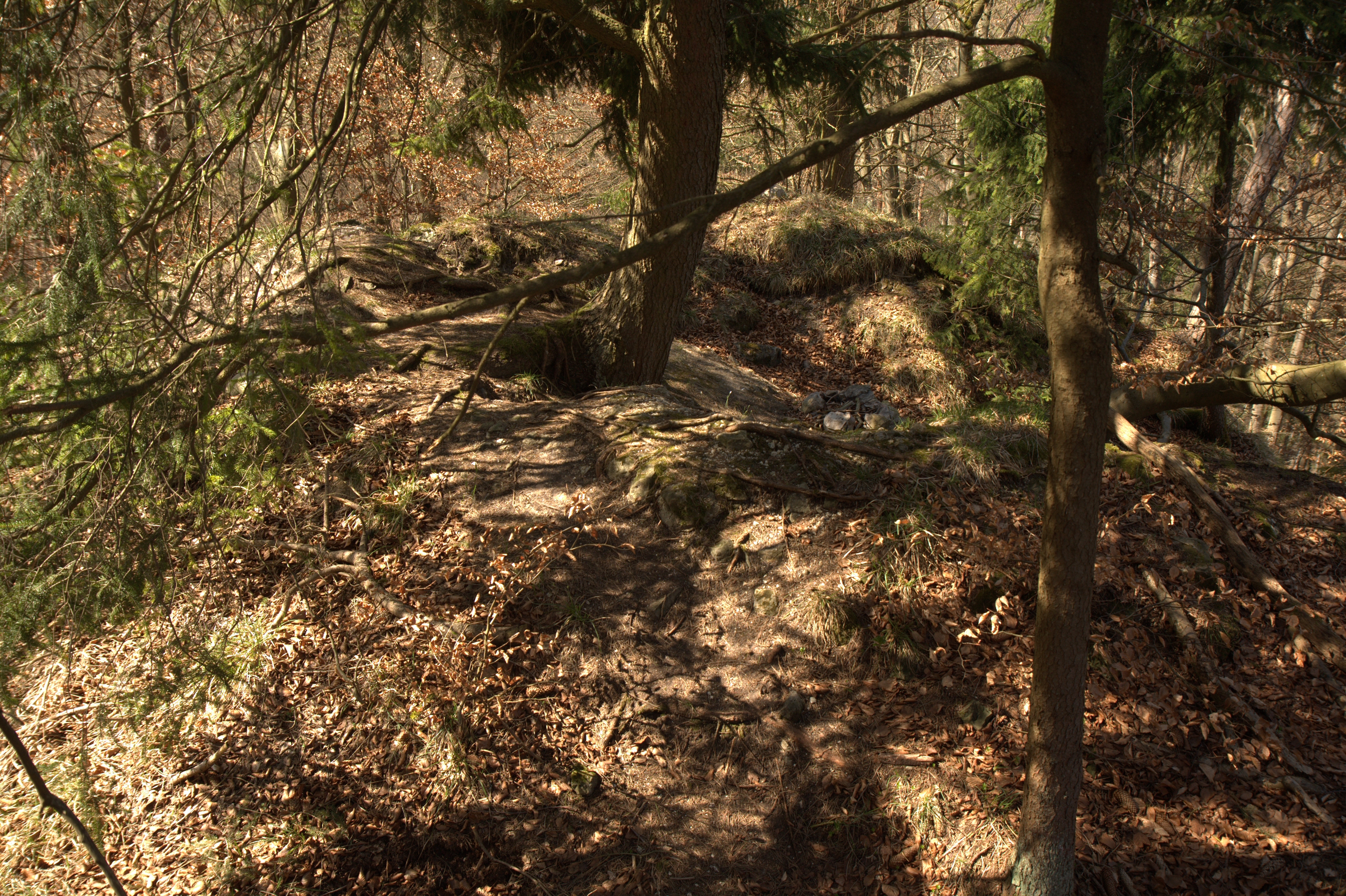 Burgstall Löweneck - Grundmauerrest eines turmförmigen Gebäudes